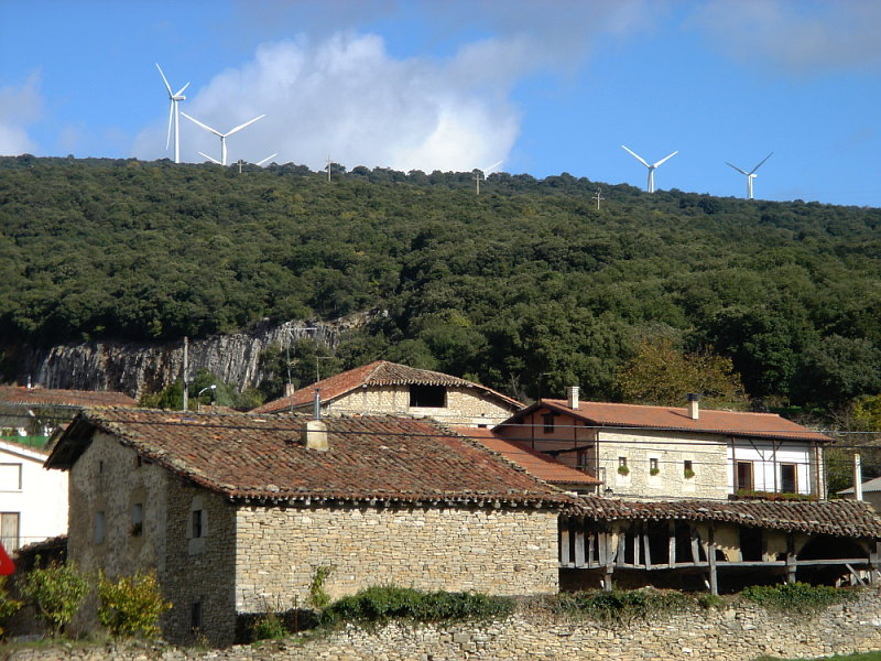 Subilla Morillas eta Badaiako haizerrotak